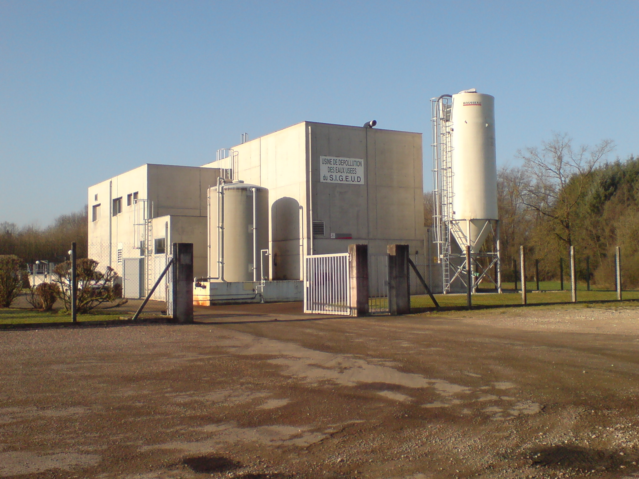 La station d'épuration de Lure (Haute-Saône, France). Elle comporte deux bassins.